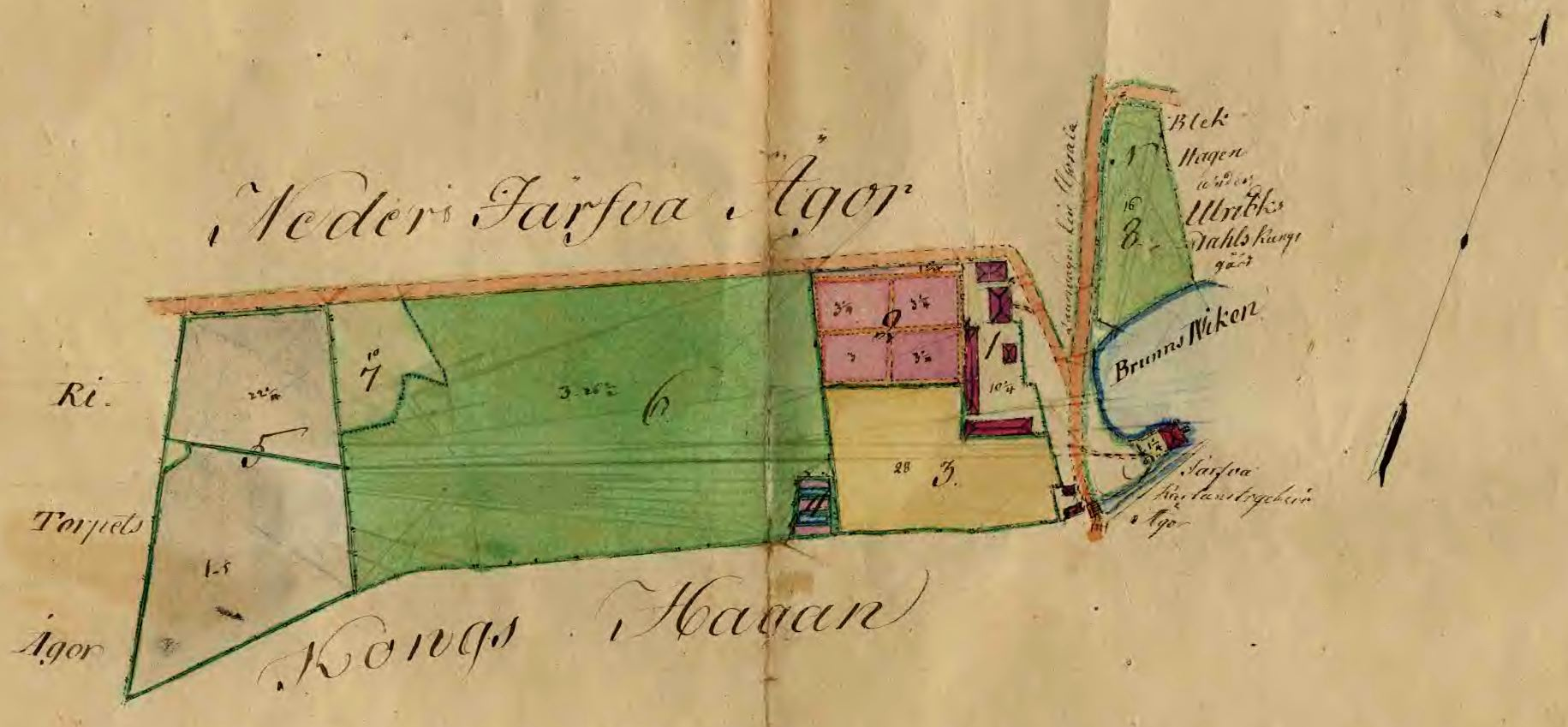 Karta över Järva krog